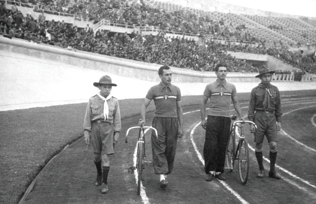 Los mexicanos participando en competencia sudamericana